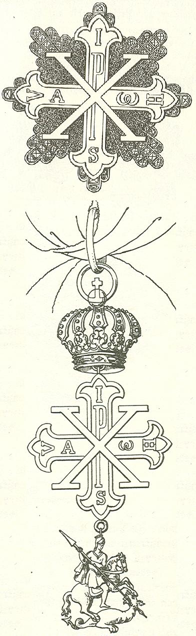 Eigen scans van een boek uit 1893 Zelf bewerkt tot één afbeelding